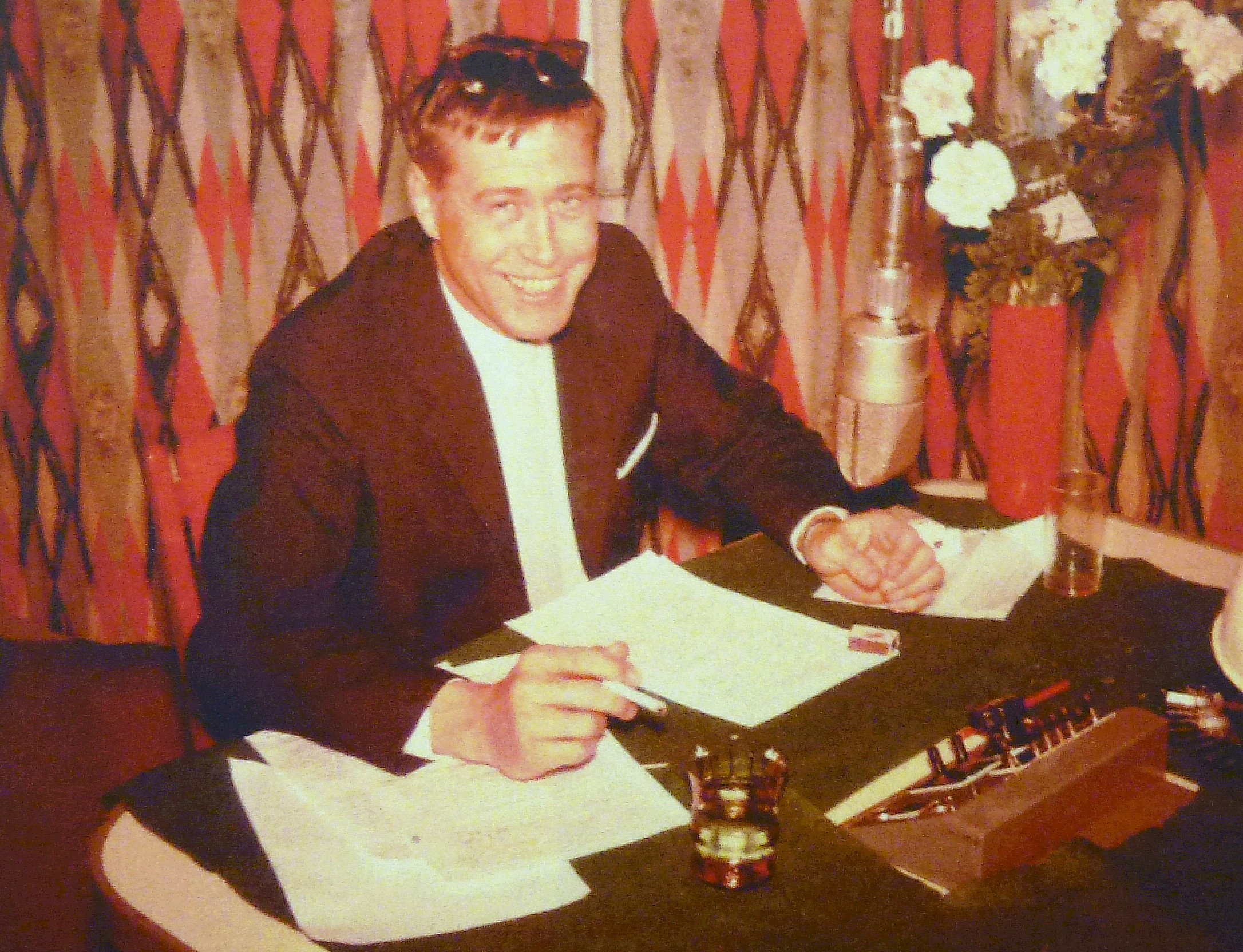 Pekka Langer